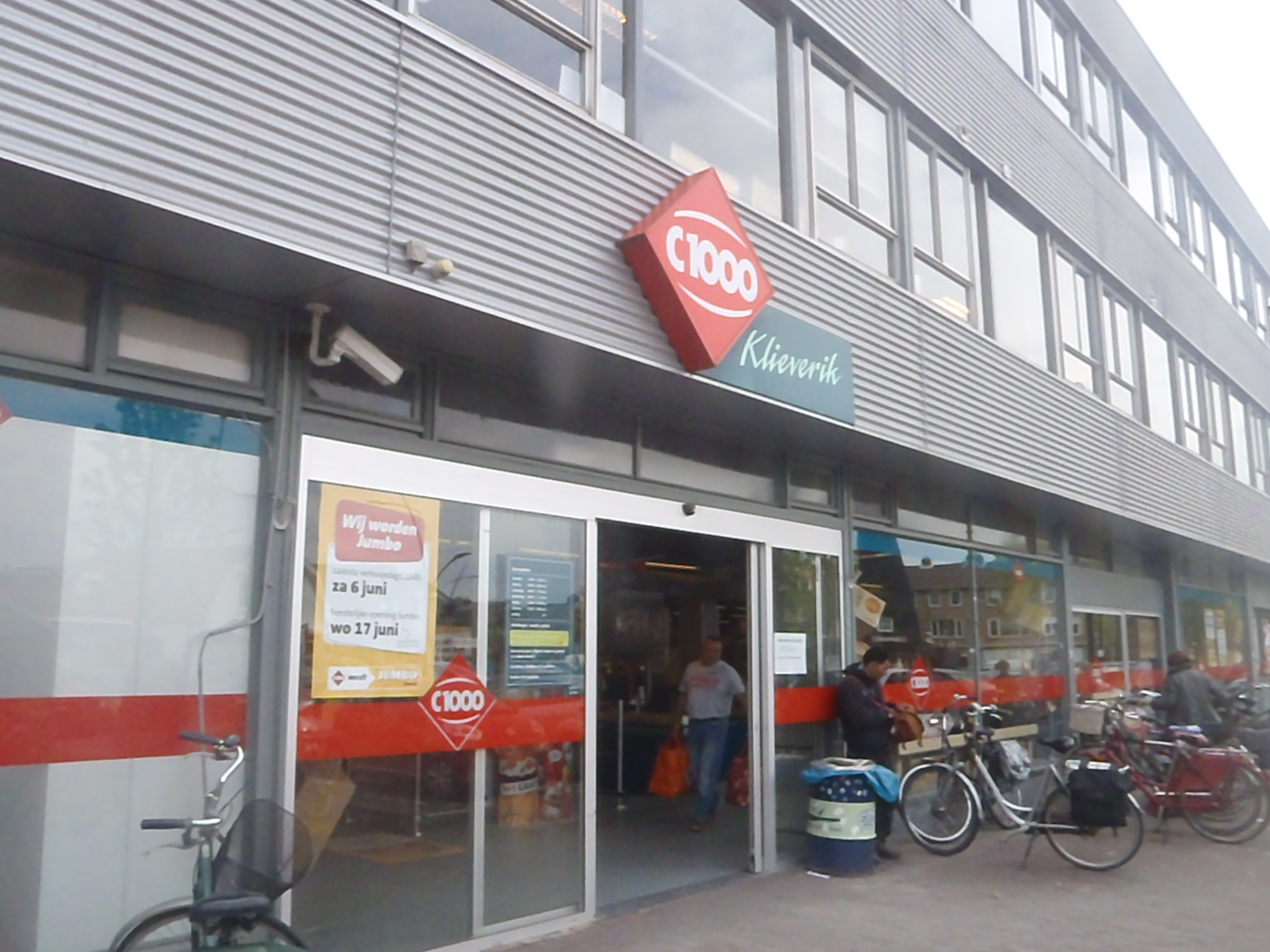 Een filiaal van C1000 in Hengelo. Inmiddels omgebouwd tot Jumbo.